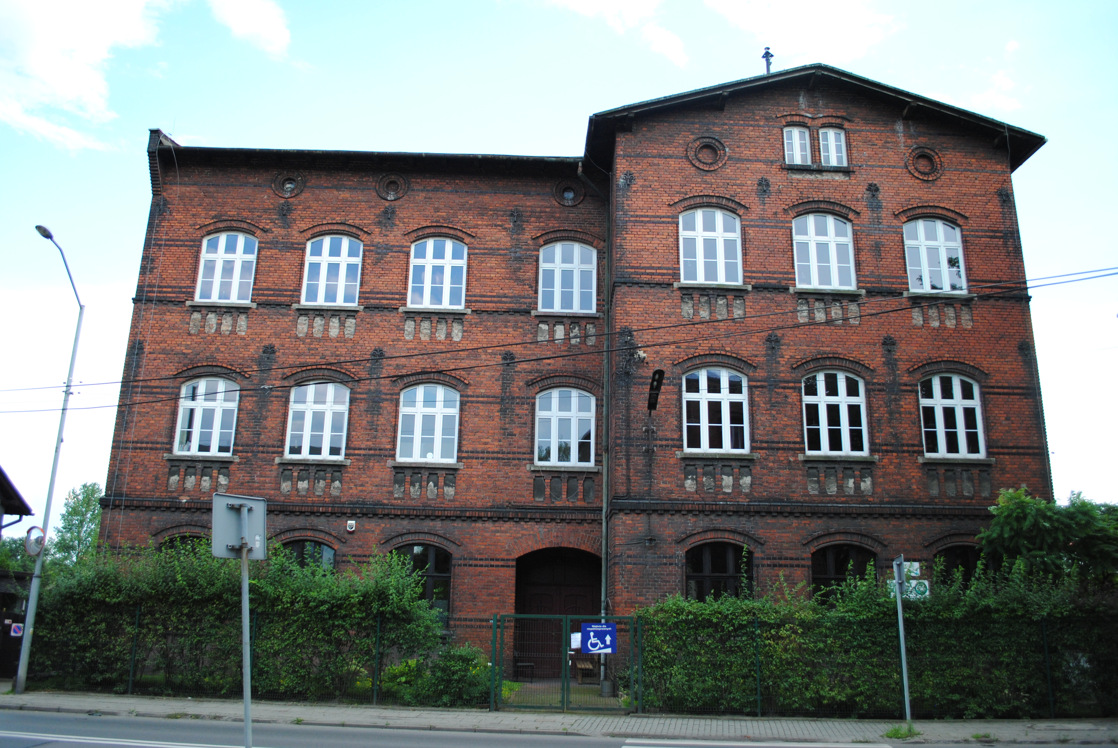 Katowice - Janów-Nikiszowiec Ul. Oswobodzenia. Środowiskowy Dom Samopomocy przy Śląskim Stowarzyszeniu Ad Vitam Dignam